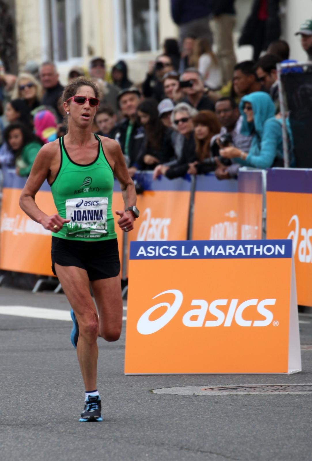 Joanna Zeiger